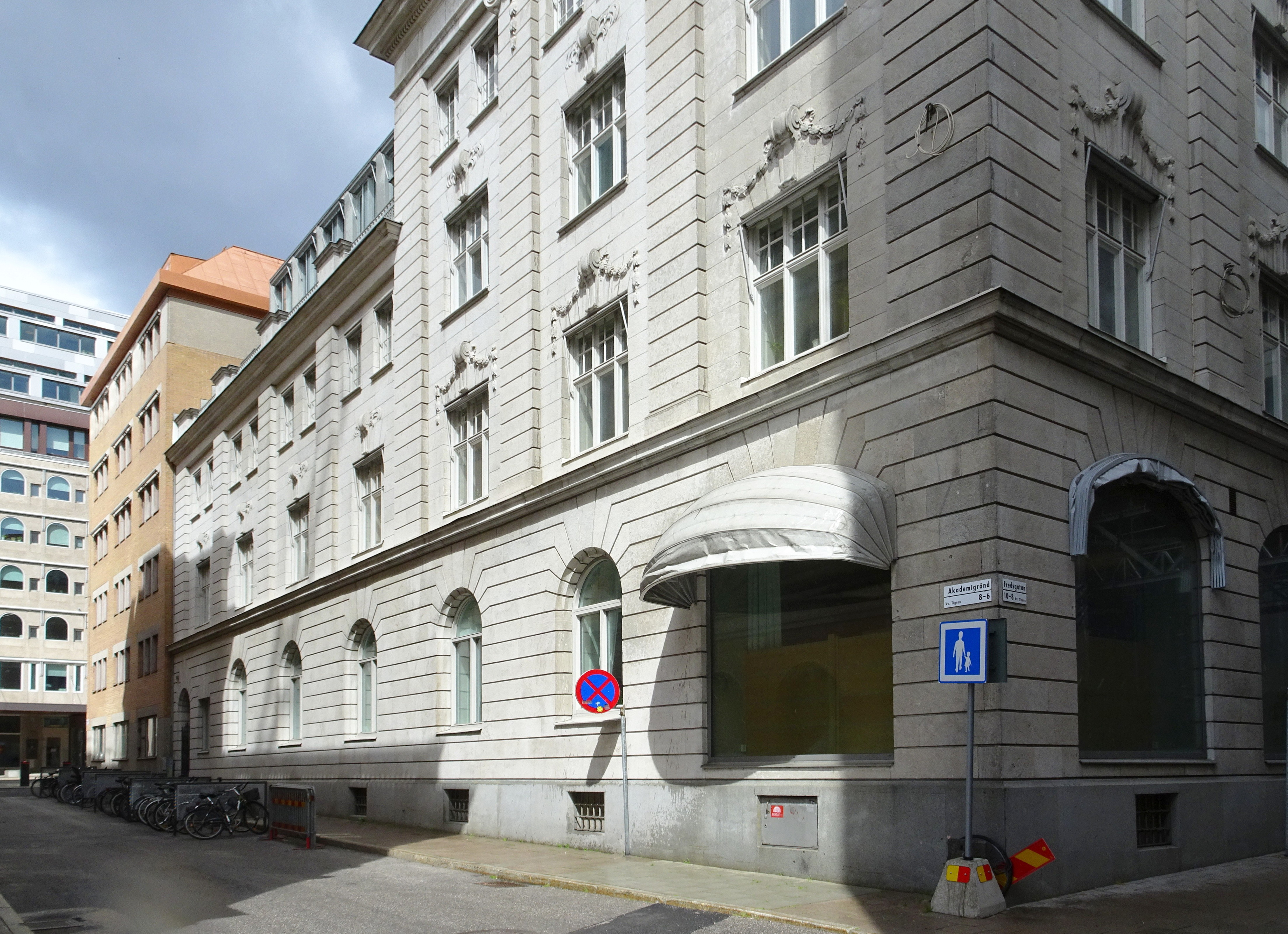 Norrlandsbanken, Fredsgatan 10 och Akademigränd 6 Stockholm. Byggnadsår 1902-1904. Arkitekt Ernst Stenhammar